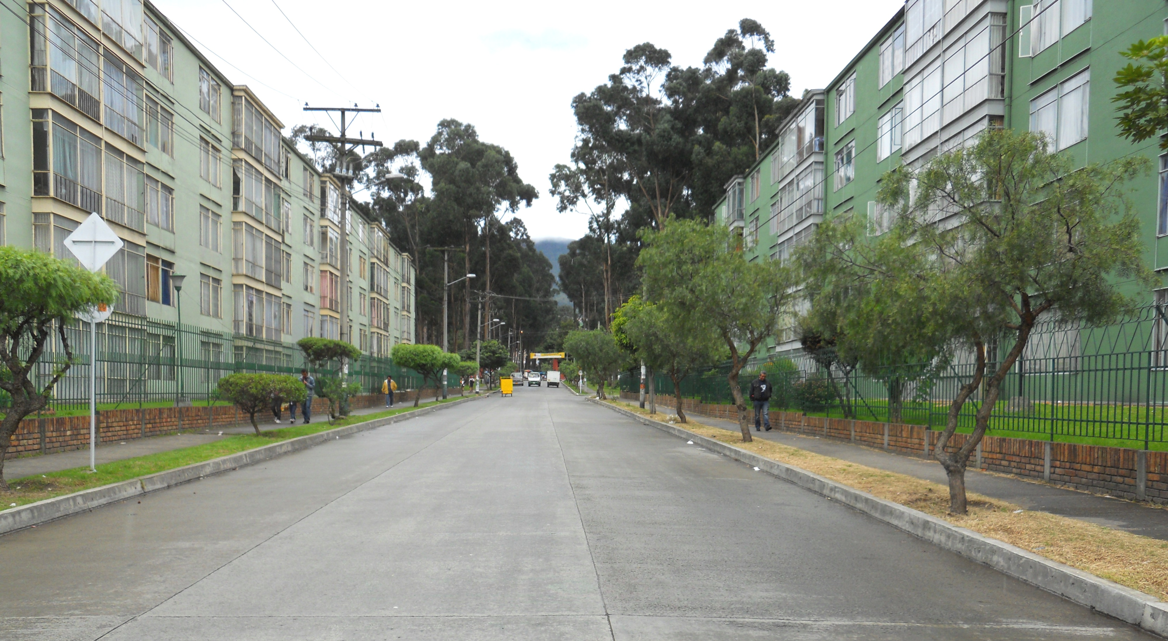 Carrera 13 A con calle 31 sur, hospital San Carlos. Bogotá.